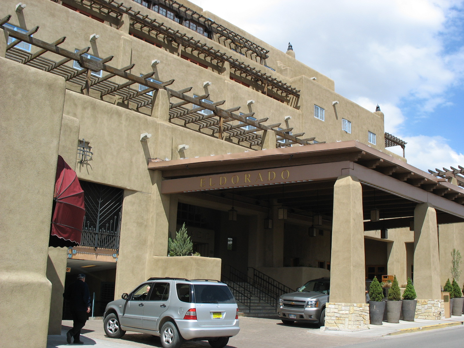 Eldorado Hotel